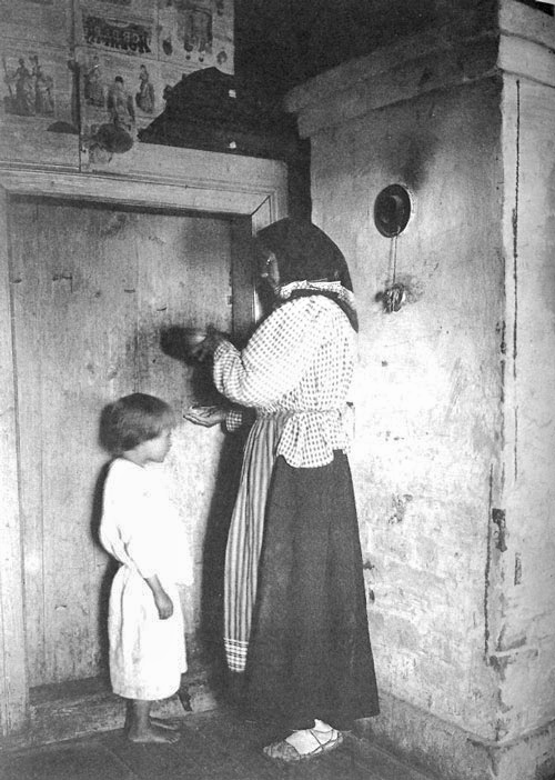 Знахарка лечит ребенка наговоренной водой. Рязанская губ., Касимовский у., с. Увяз. 1914